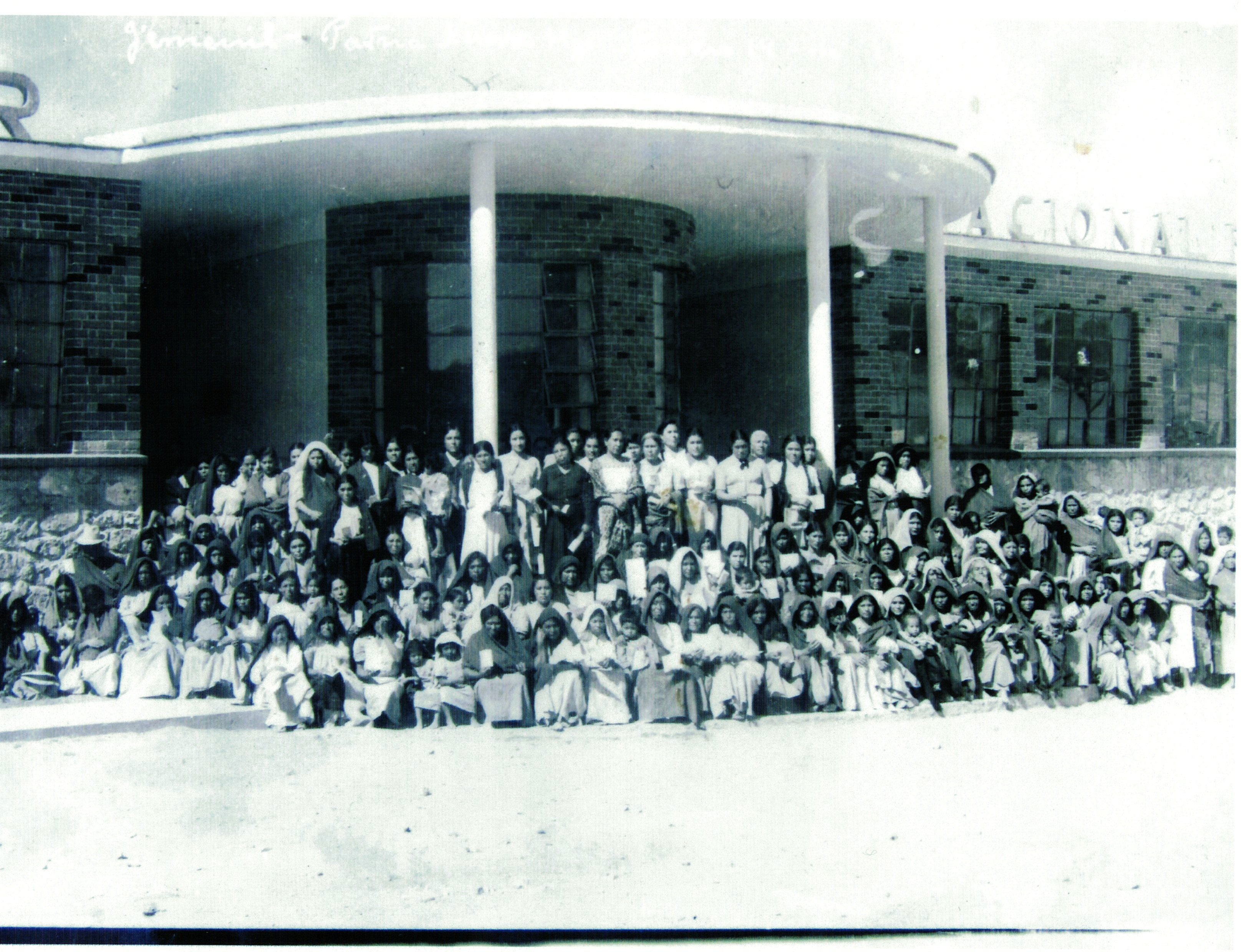 Escuela Primaria en sus primeros años